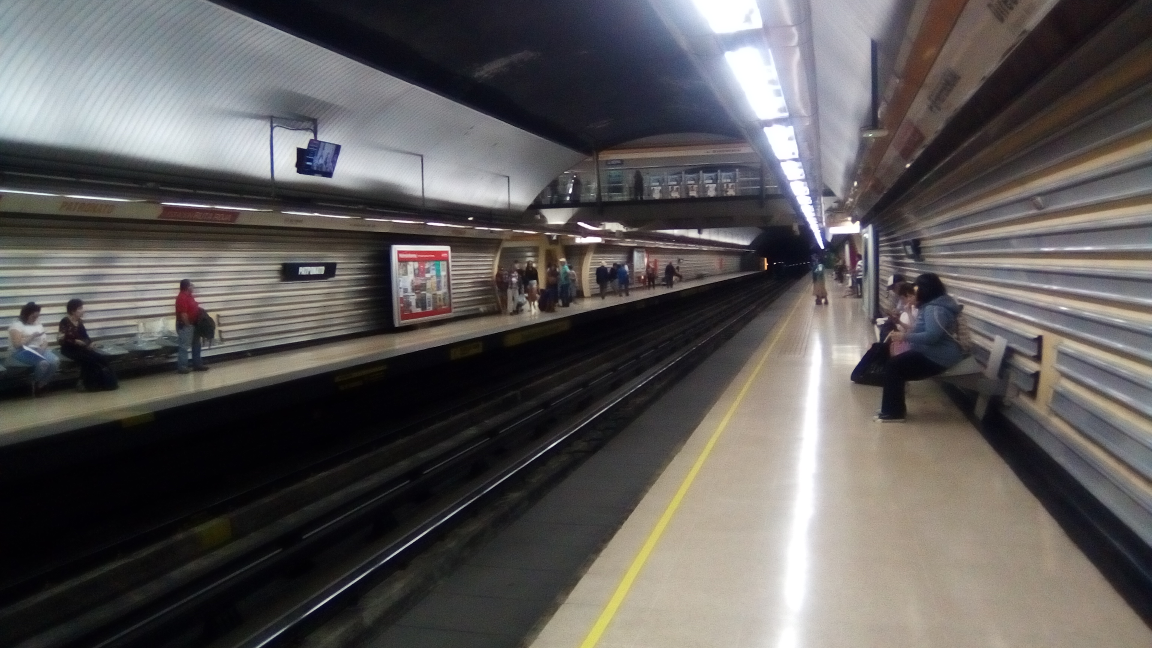 Estación Patronato